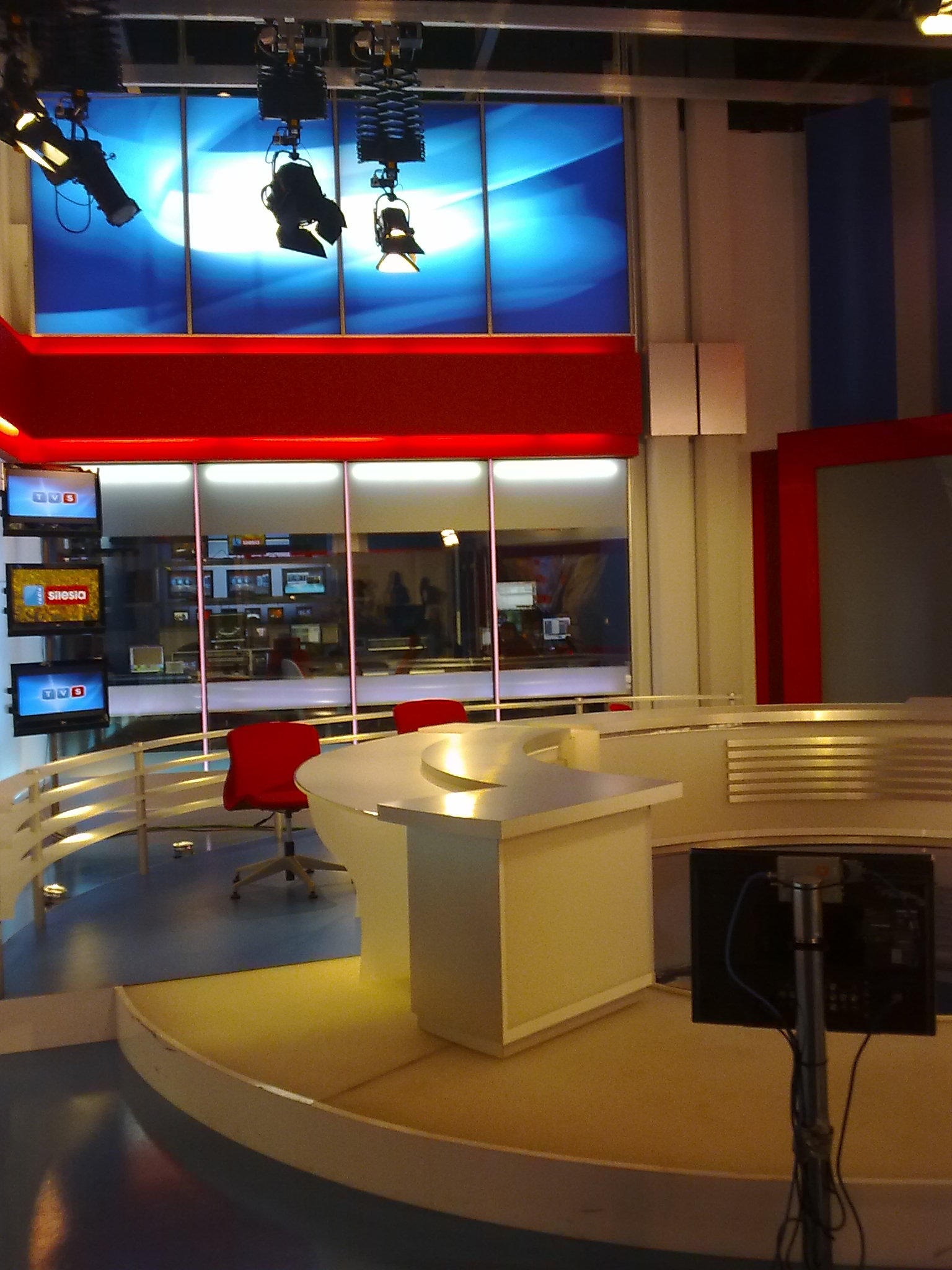 Główne Studio TVS